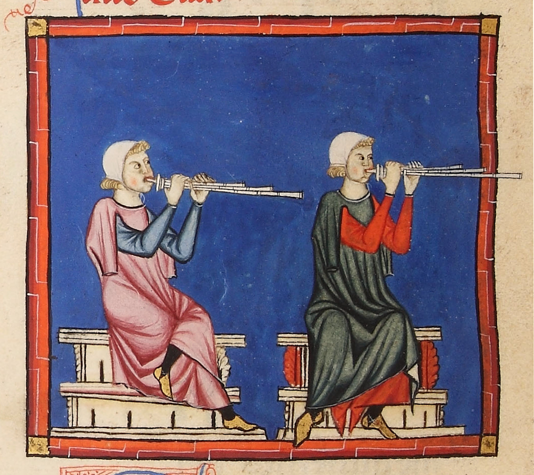 Illustration from Escorial Codex E, folio 79r, Cantigas de Santa Maria manuscript.